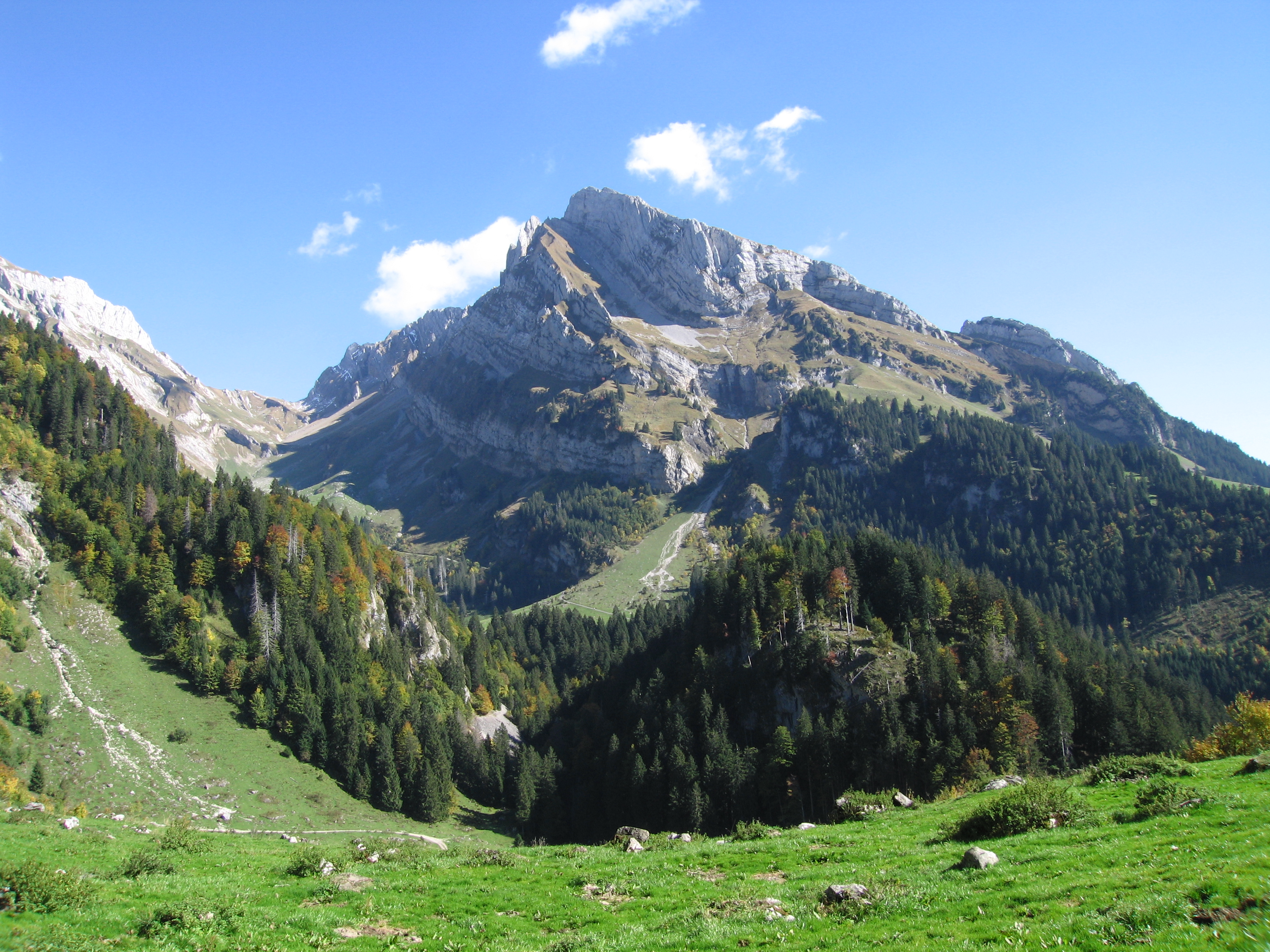 Widhauser Schafberg von der Laui aus